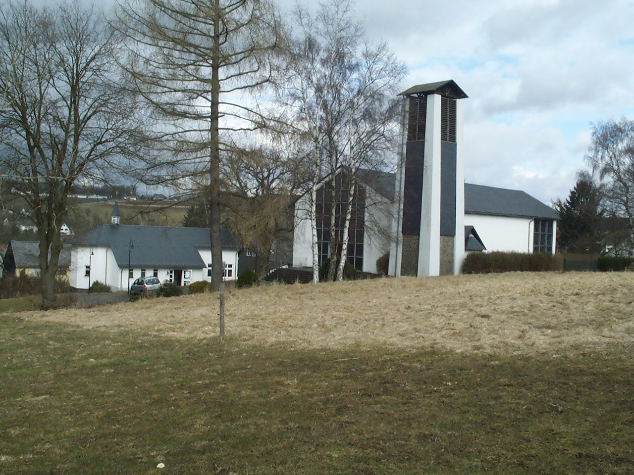 Church "Maria Königin", Hattert